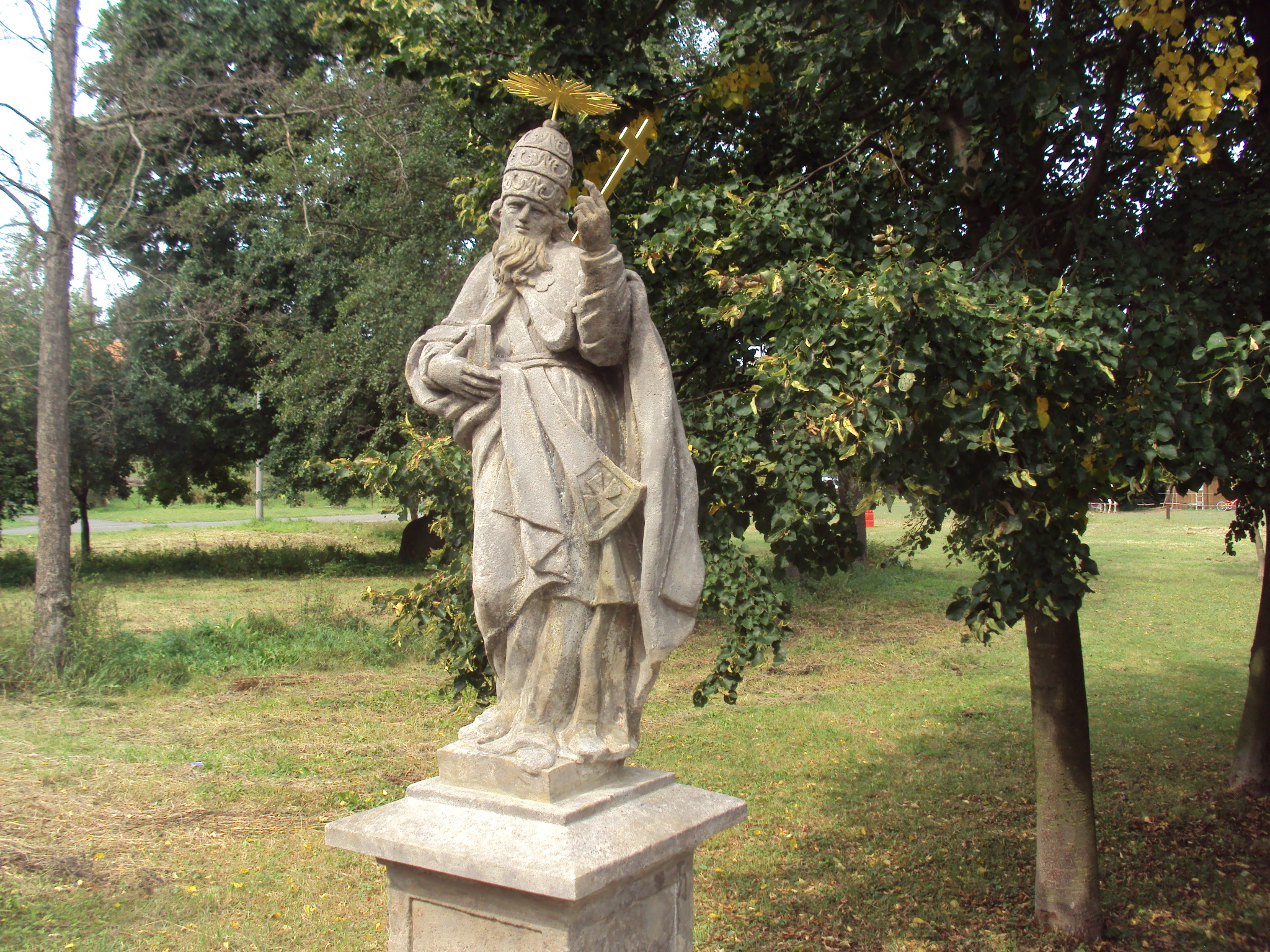 Socha svatého Fabiána, Mostecká ulice, Zákupy